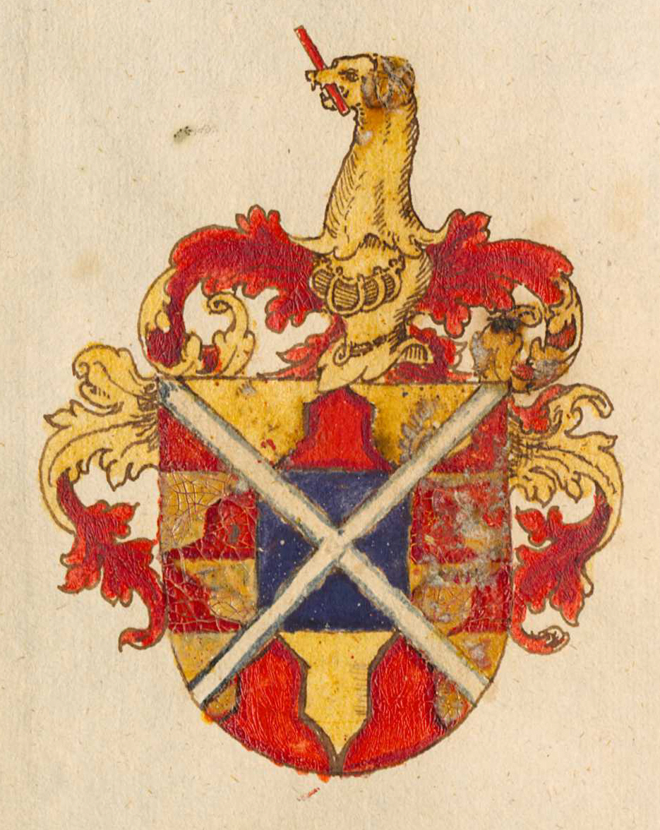 Wappen Graf von Oettingen